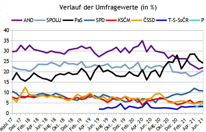 Umfragen zur Parlamentswahl in Tschechien 2021